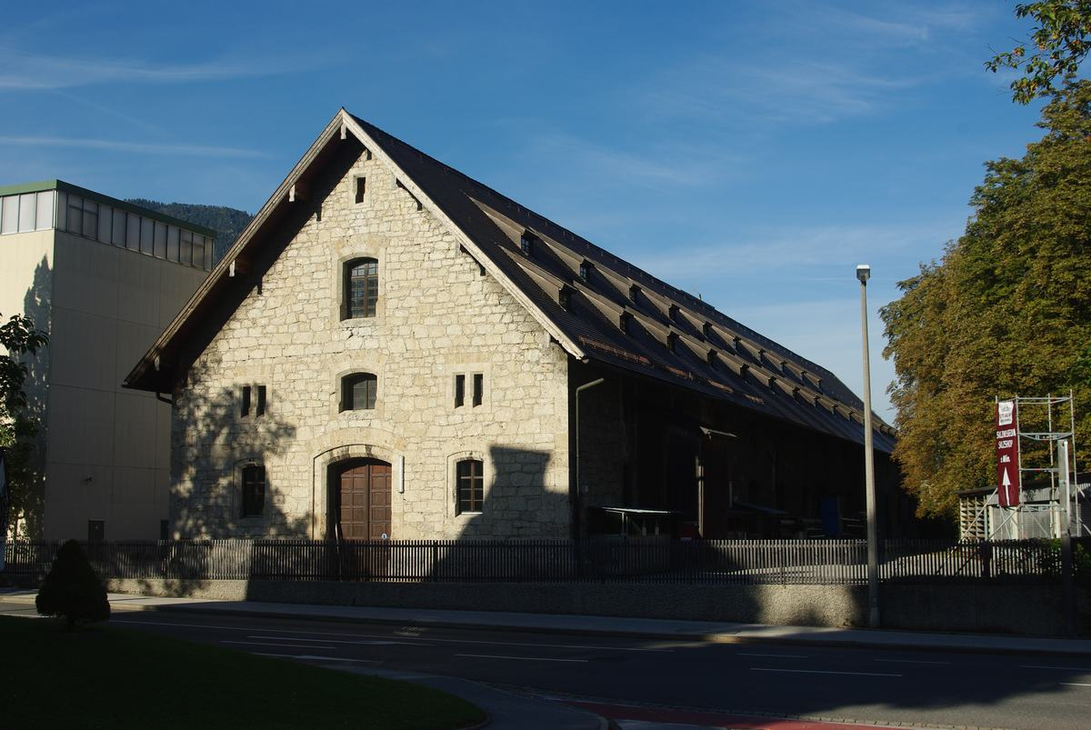 Reichenbachstr. 2, 83435 Bad Reichenhall (ehem. Salinenstadl)This is a photograph of an architectural monument.